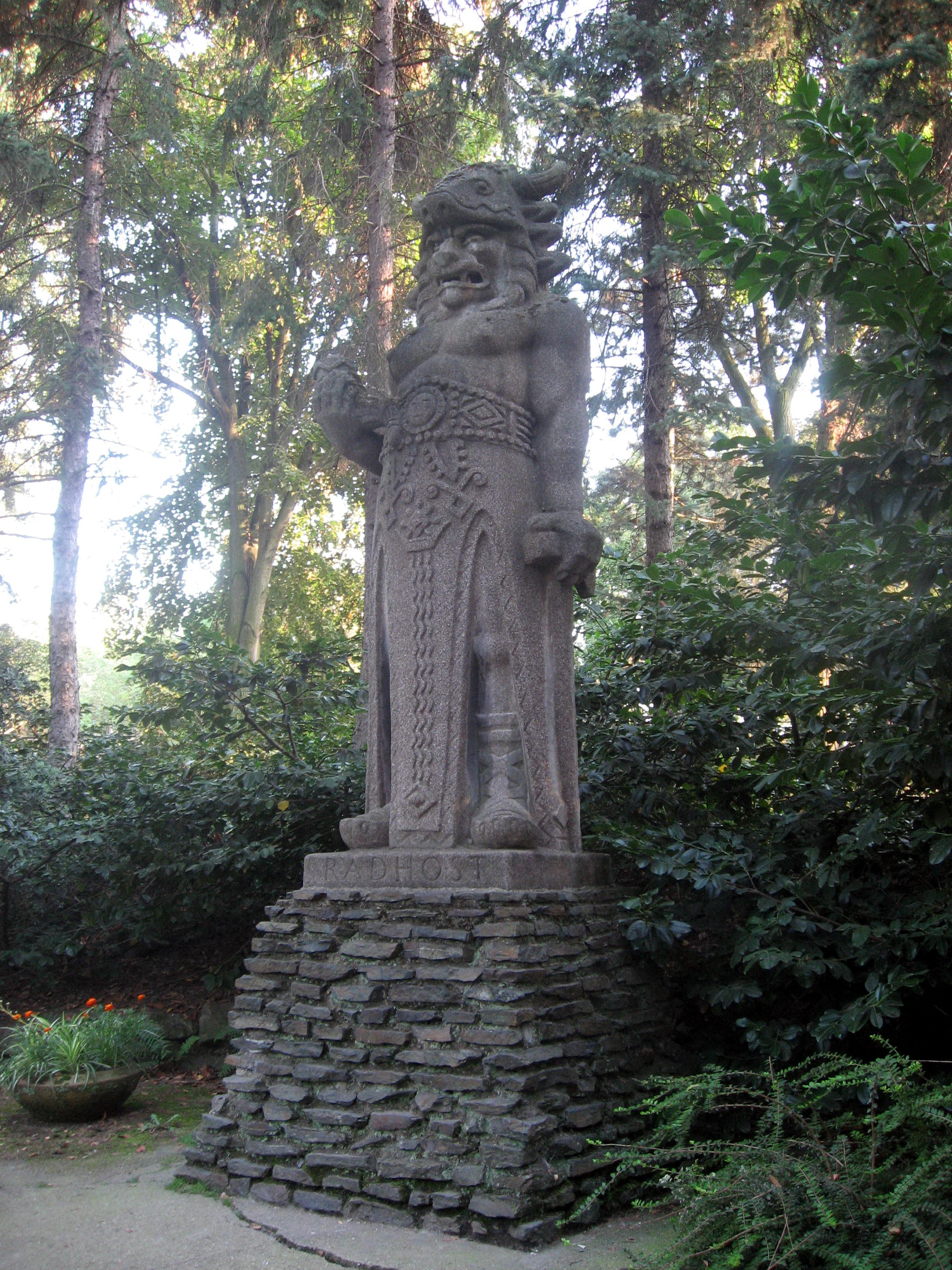 Socha Radegasta v Zoologické zahradě Praha